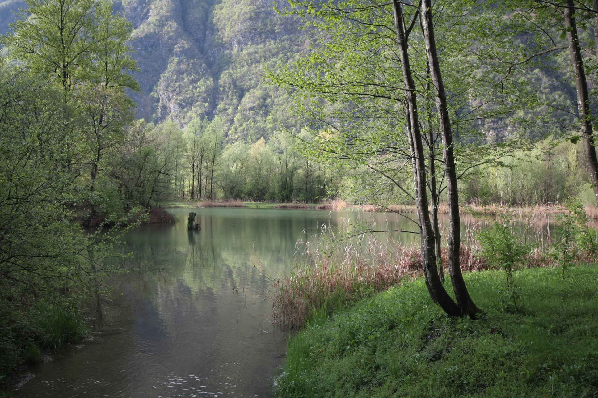 Lo stagno più grande all'interno del Biotopo Fontanazzo